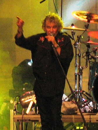 Dan McCafferty, Nazareth, Rzeszów 2009